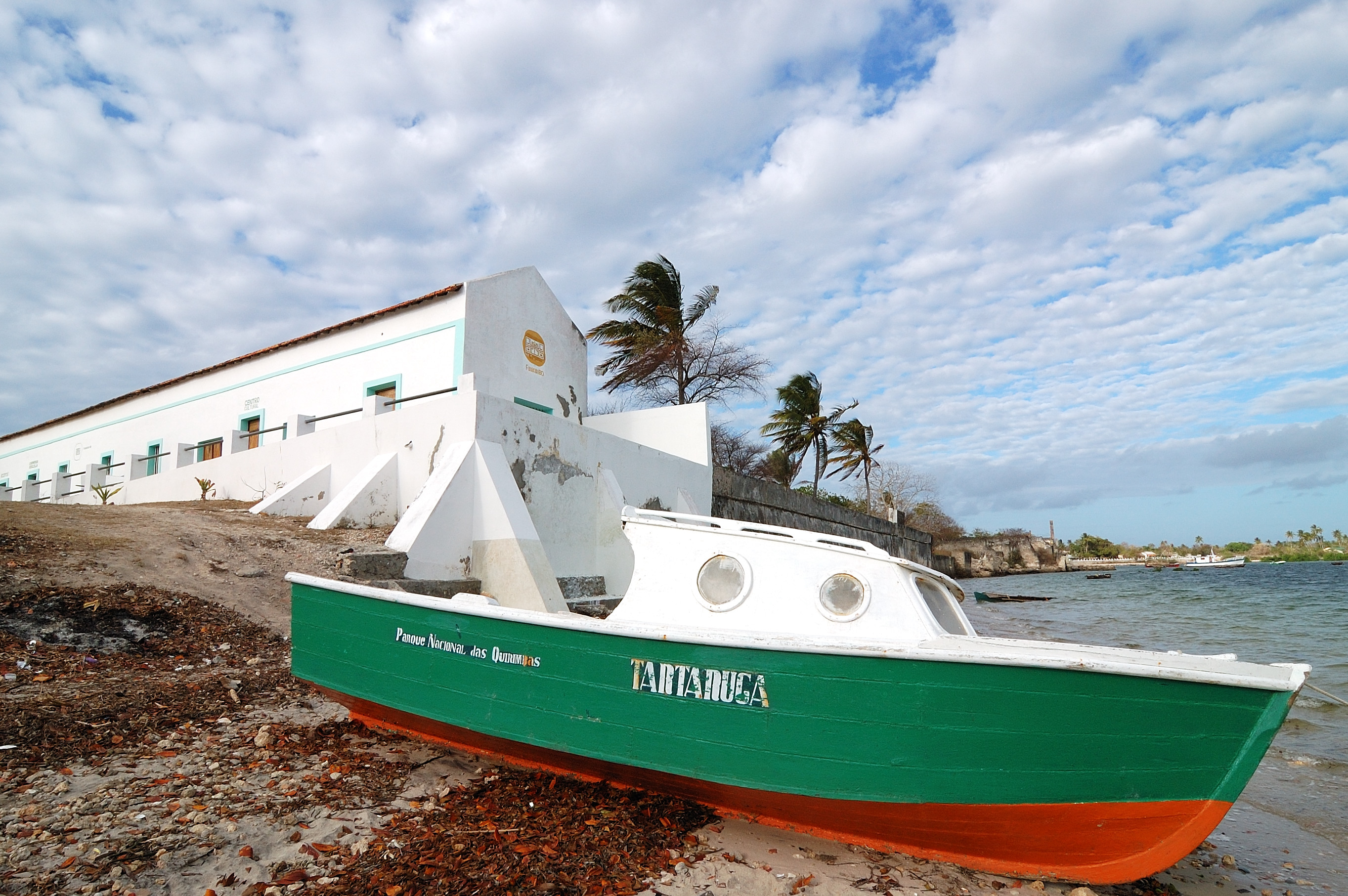 Boat at Ilha do Ibo, Mozambique [2009]